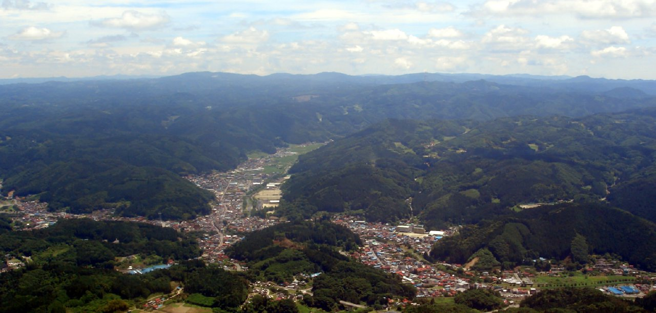 福島県石川町上空より東に阿武隈高地を望む。侵食による残邱が各所に残る。